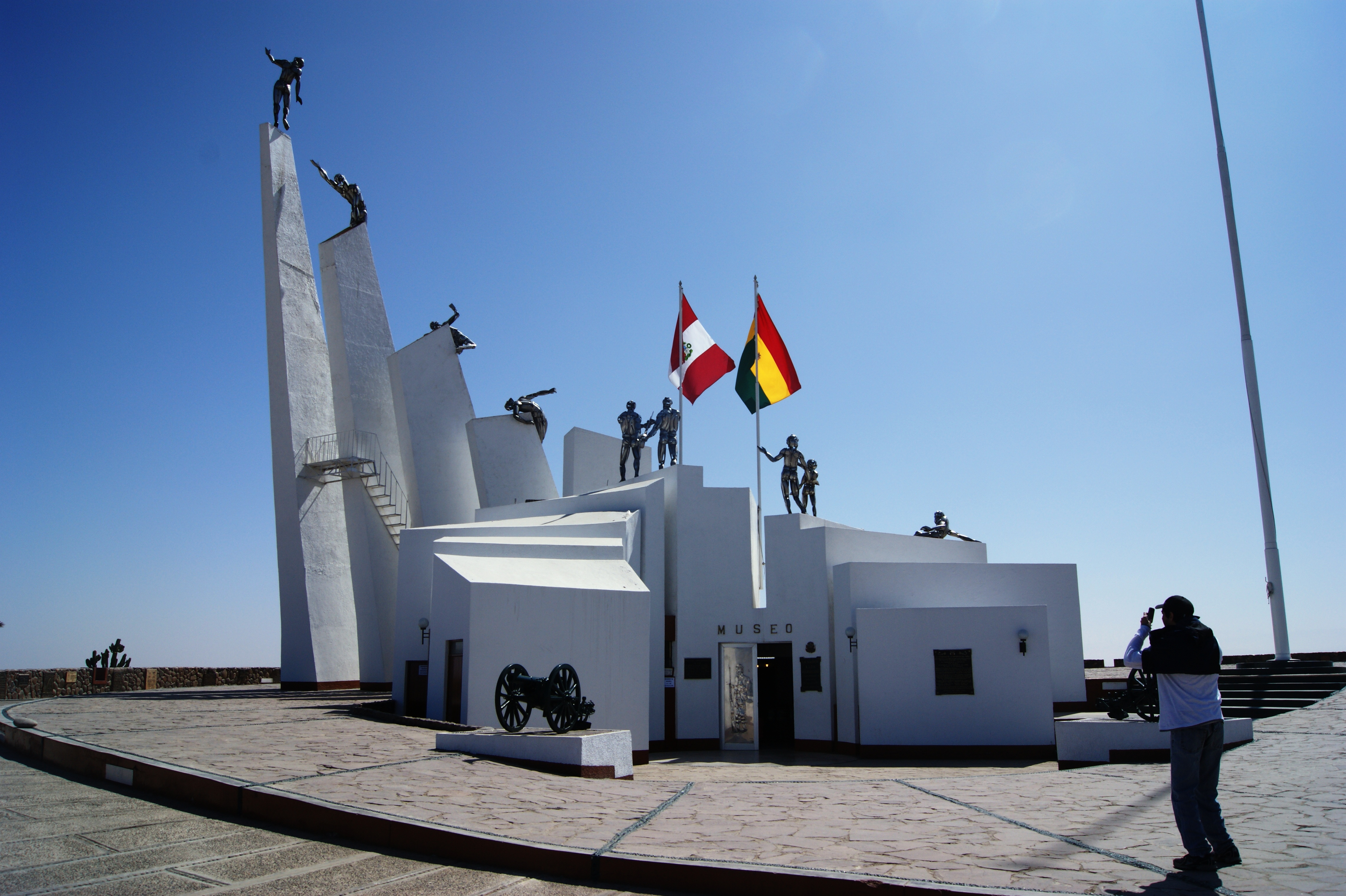 Vista global. Museo de Sitio del Alto de la Alianza. Tacna - Perú.